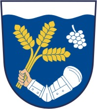 Plenkovice